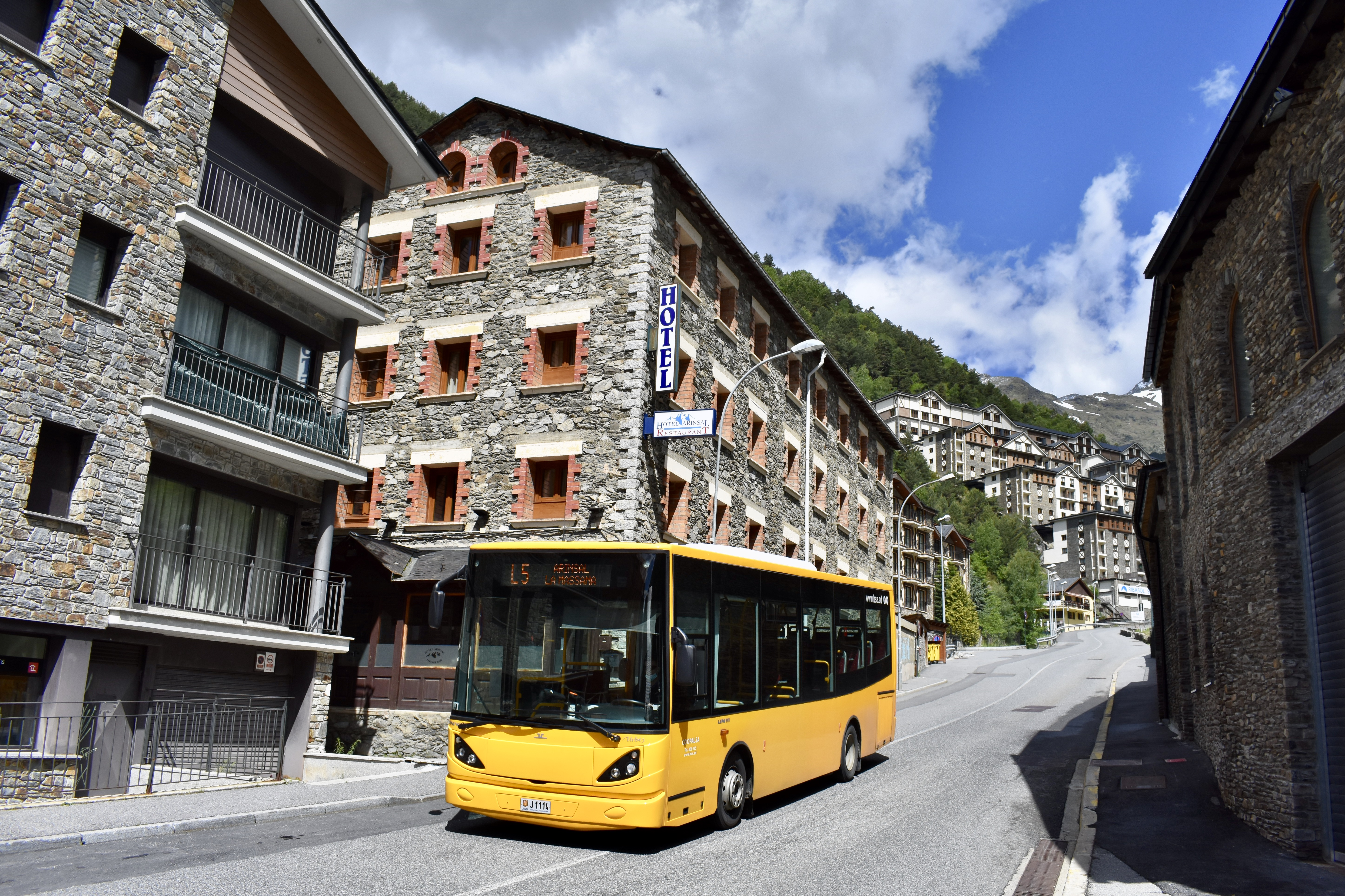 Man 12.220 Unvi Urbis du réseau de transports publics de la Principauté d'Andorre sur la ligne L5 à La Massana.